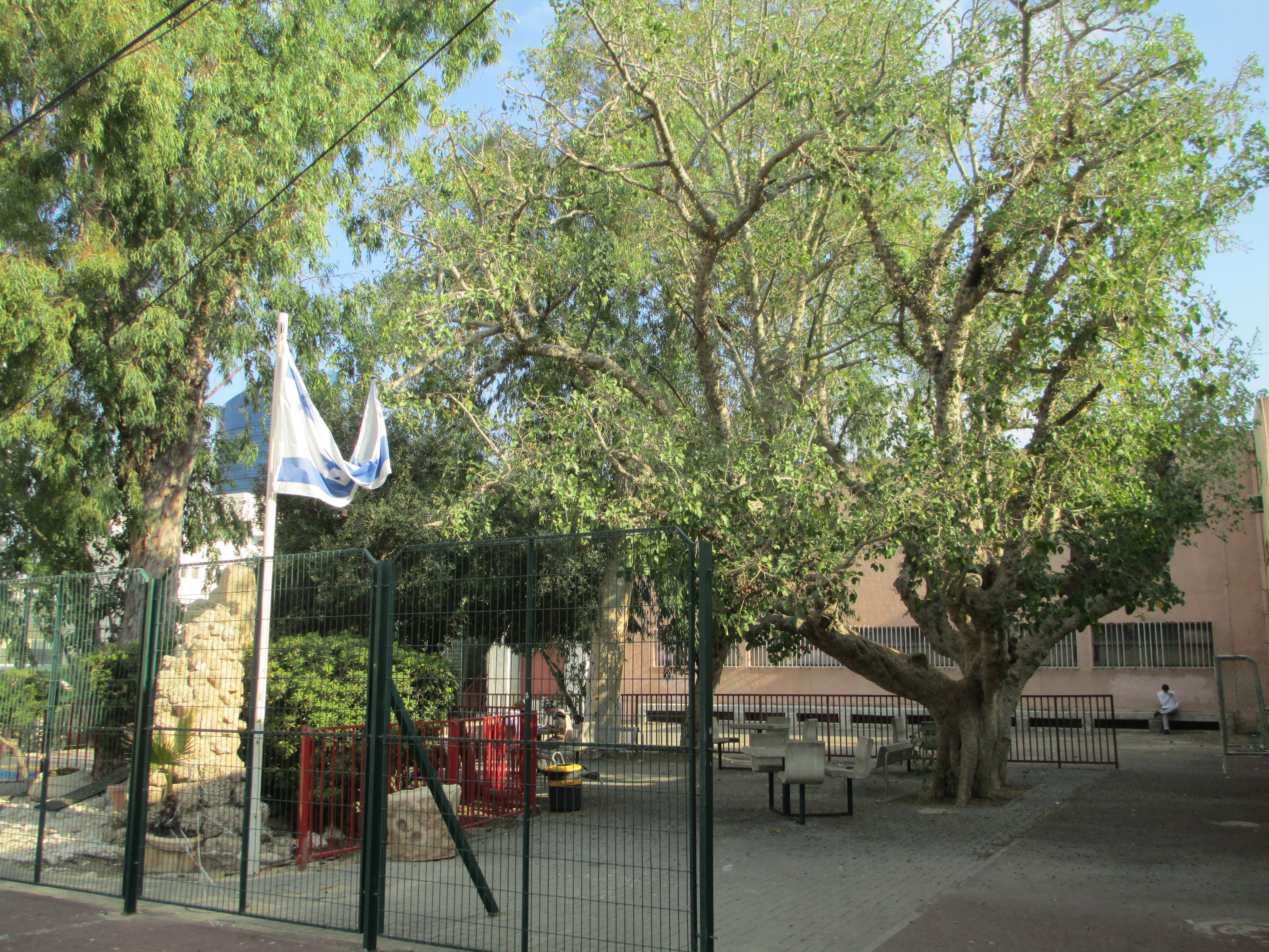 השקמה העתיקה על "הר התקווה" בבית הספר שבח מופת